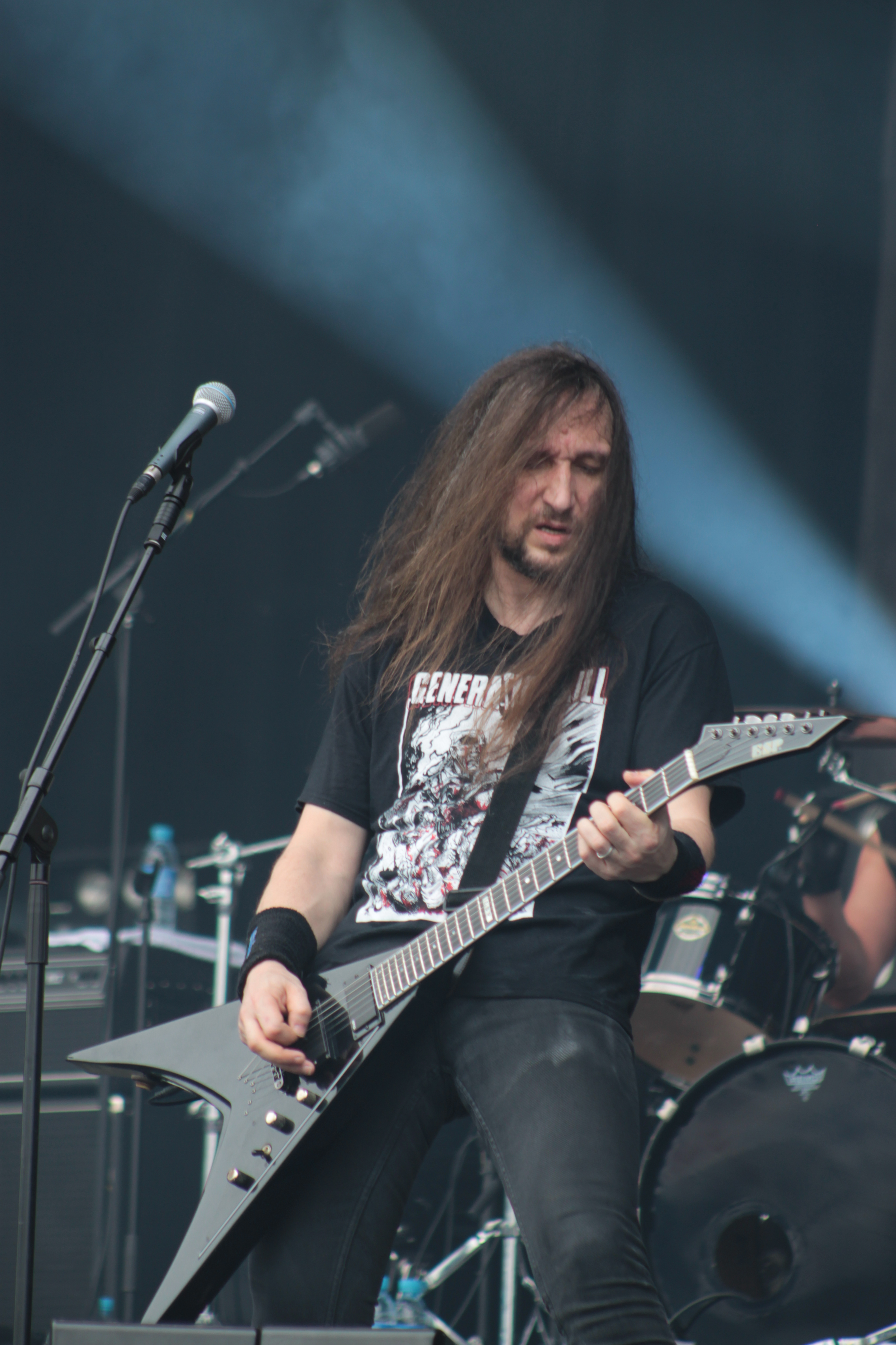 Kragen Lum, Heathen, Helfest 2013, Fr-44-Clisson.